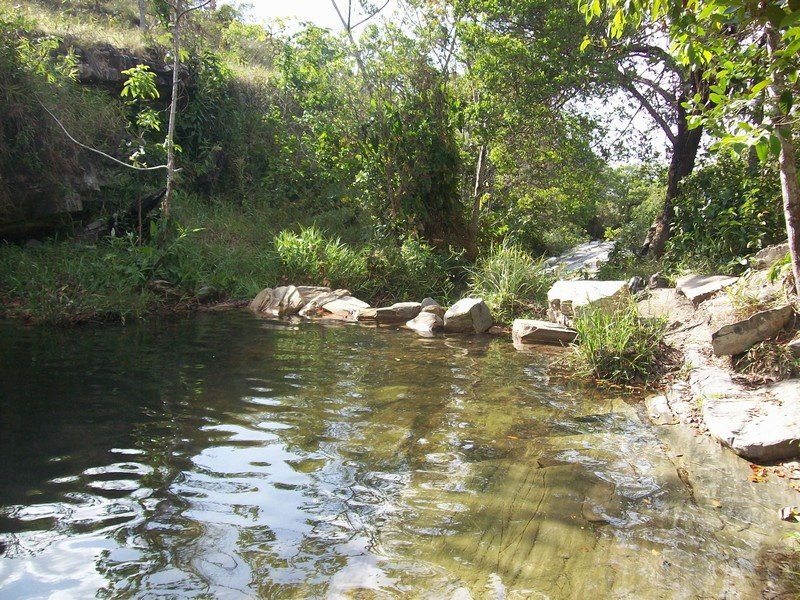 Poço do 17 que fica na fazenda de José Marciano, Serra da Miaba, Sergipe